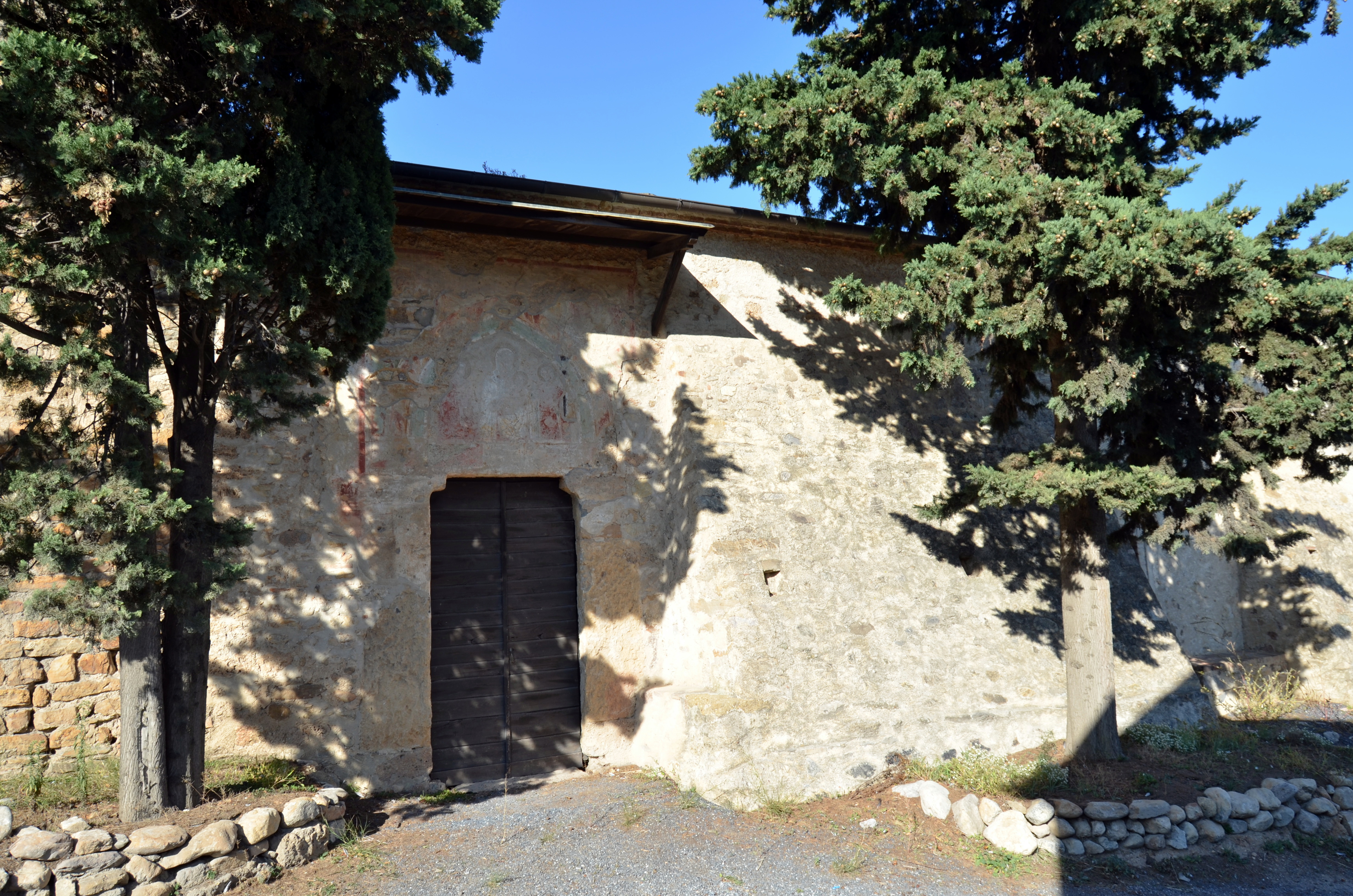 La chiesa di Santo Stefano di Massaro, Bastia, Albenga, Liguria, Italia